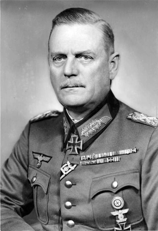 Wilhelm Keitel Zentralbild Generalfeldmarschall und Chef des Oberkommandos der Wehrmacht Wilhelm Keitel ]Porträt[ geb. 22.9.1882 in Helmscherode gest: hingerichtet am 16.10.1946 in Nürnberg Aufnahme 1942 [Scherl] Abgebildete Personen: Keitel, Wilhelm: Generalfeldmarschall, Ritterkreuz (RK), Heer, Deutschland (GND 118721577)